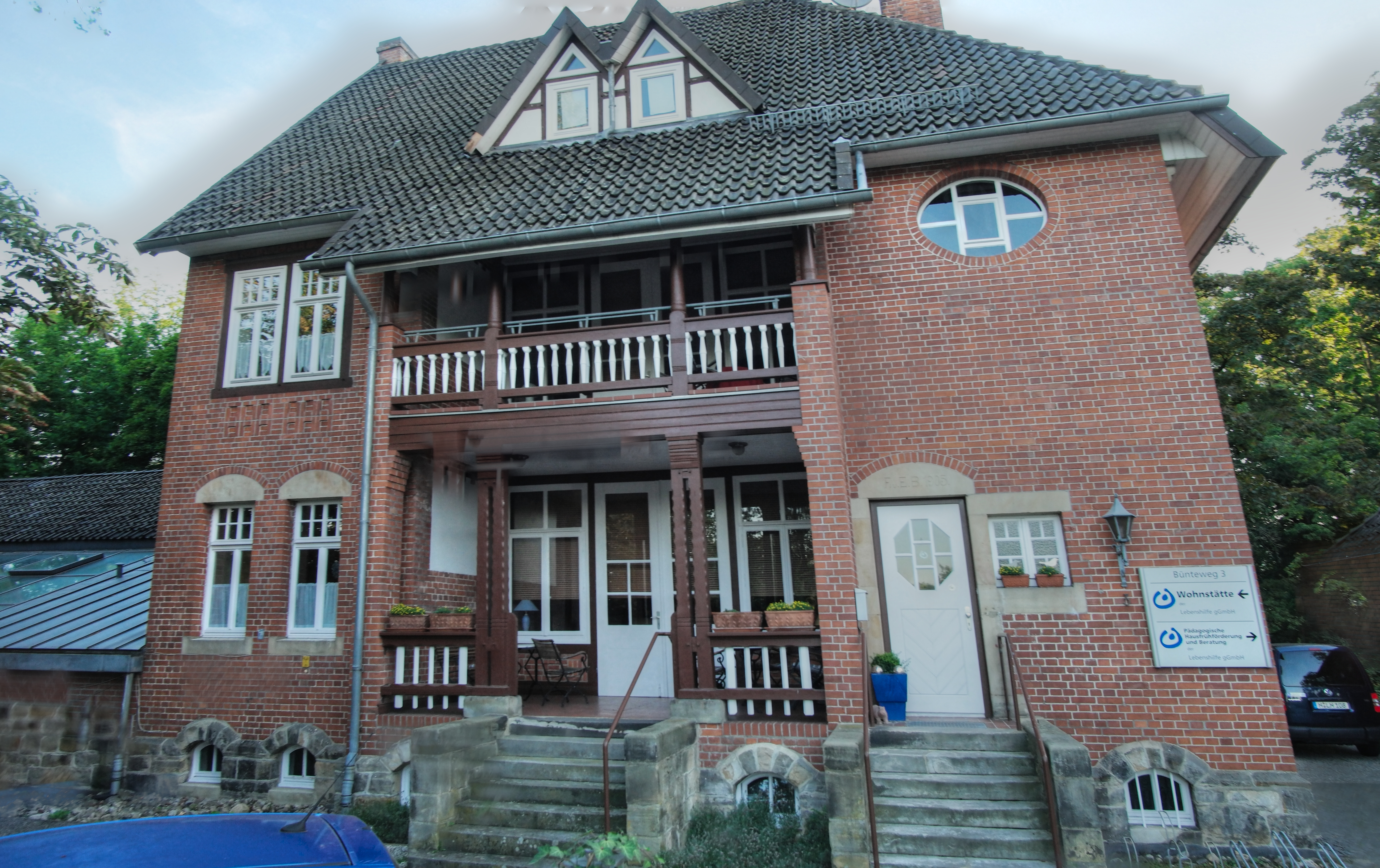 Deutschland Niedersachsen Hannover Kirchrode Bünteweg 3, 30559 Hannover Villa